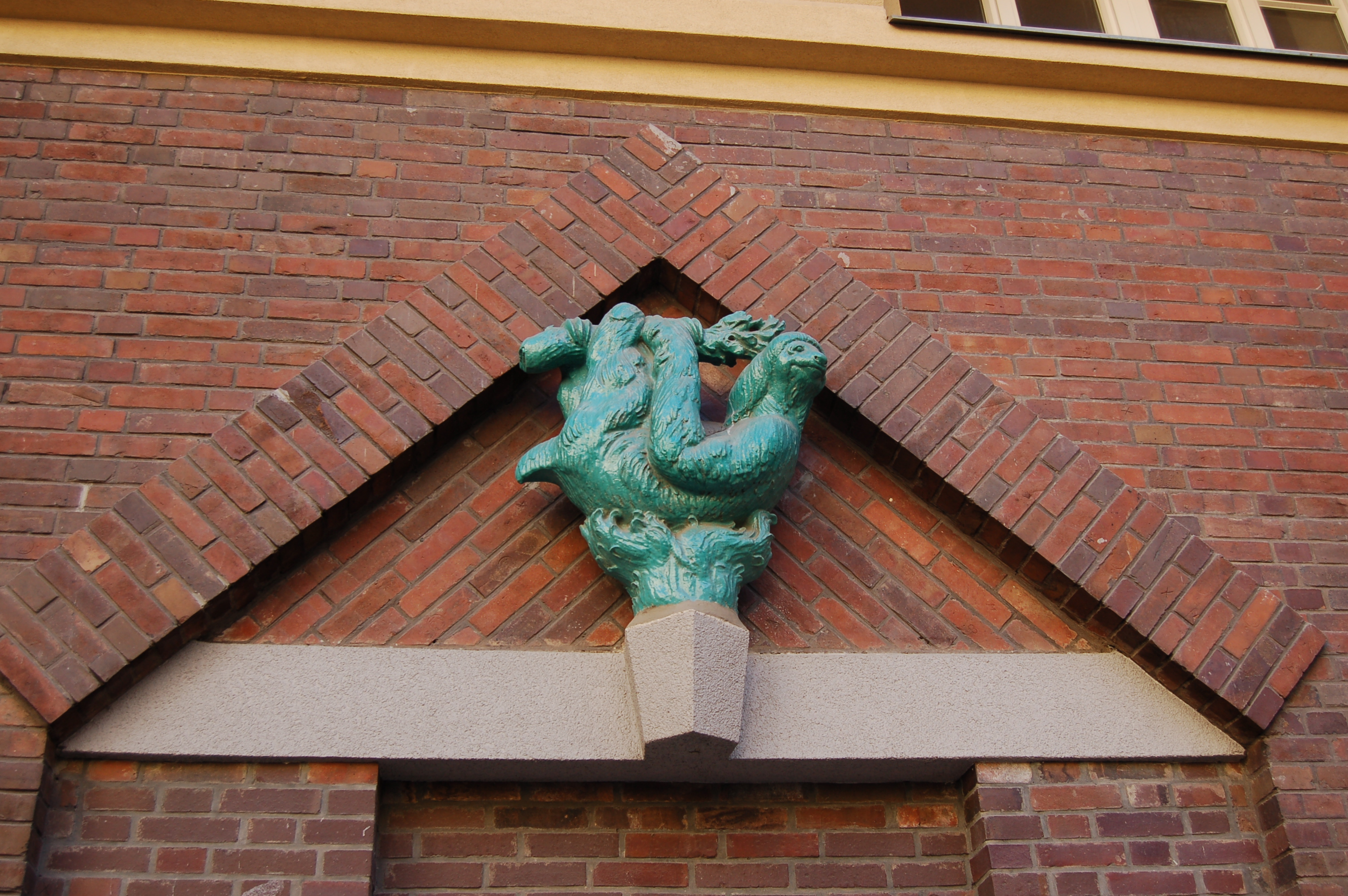 Dr.-Friedrich-Becke-Hof in Wien-Ottakring (Brüßlgasse 33-37). Keramik eines Faultiers